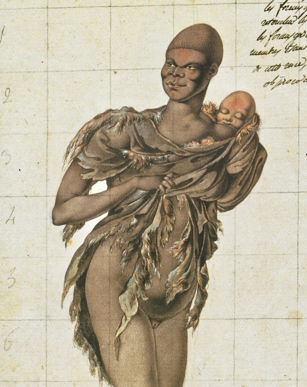 Nicolas-Martin Petit (1777–1804): Tasmanierin mit geschorenem Haar und mit Kind in Känguruhaut (Ausschnitt), Muséum Le Havre, Inv.-Nr. 20022-3. Der Künstler war Mitglied der französischen Australien-Expedition (1800–1804) unter Leitung von Nicolas Baudin (1754–1803). Die seit der Eiszeit von Festland-Australien isolierten tasmanischen Aborigines wurden später von den Briten ausgerottet.